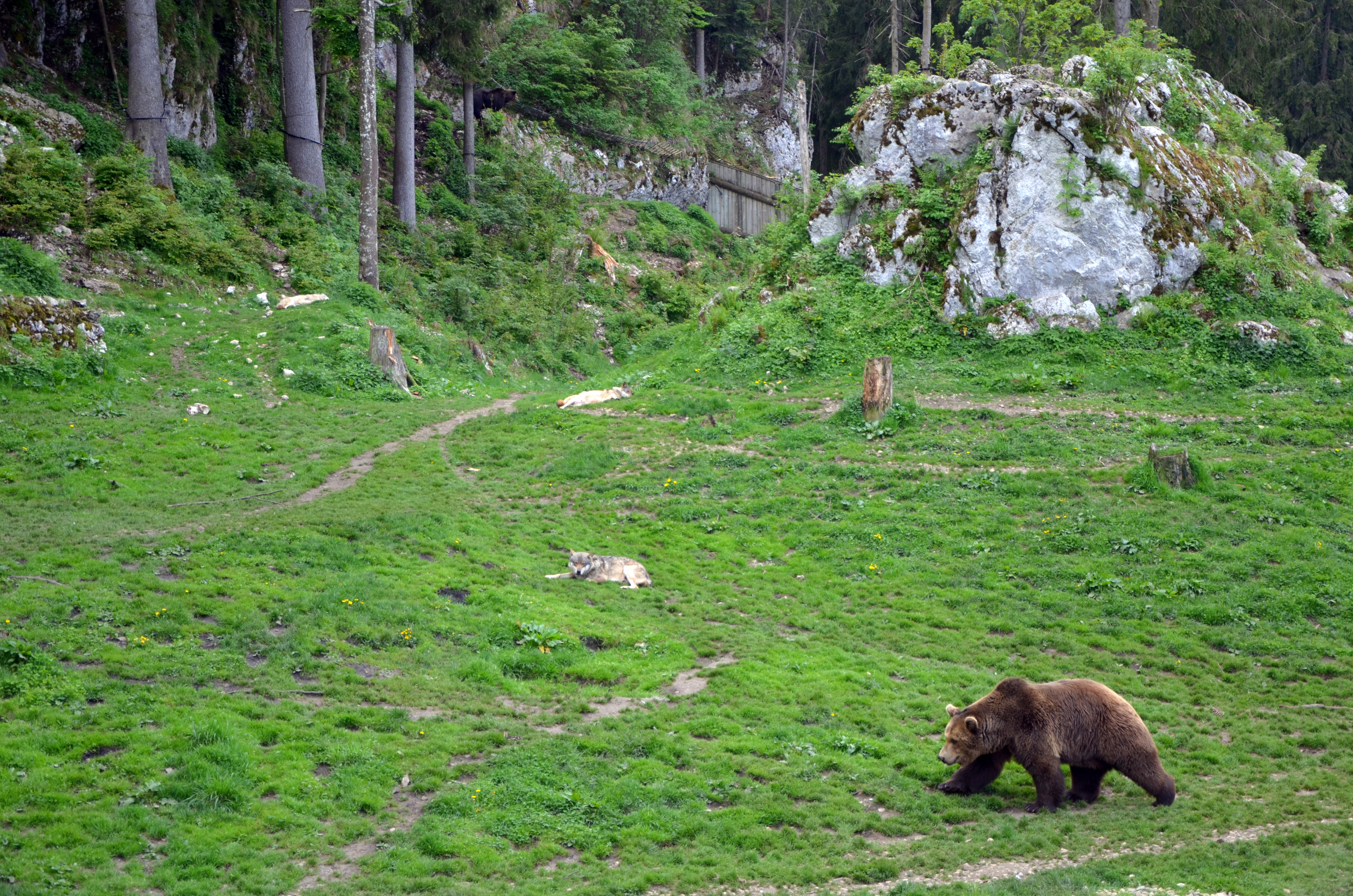 Un ours (Ursus arctos) et trois loups (Canis lupus) du Juraparc (Mont d'Orzeires, Suisse)